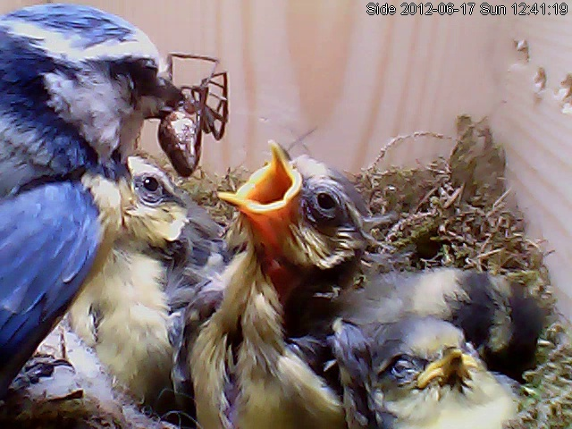 Yngste 12 dager, eldste 15 dager.